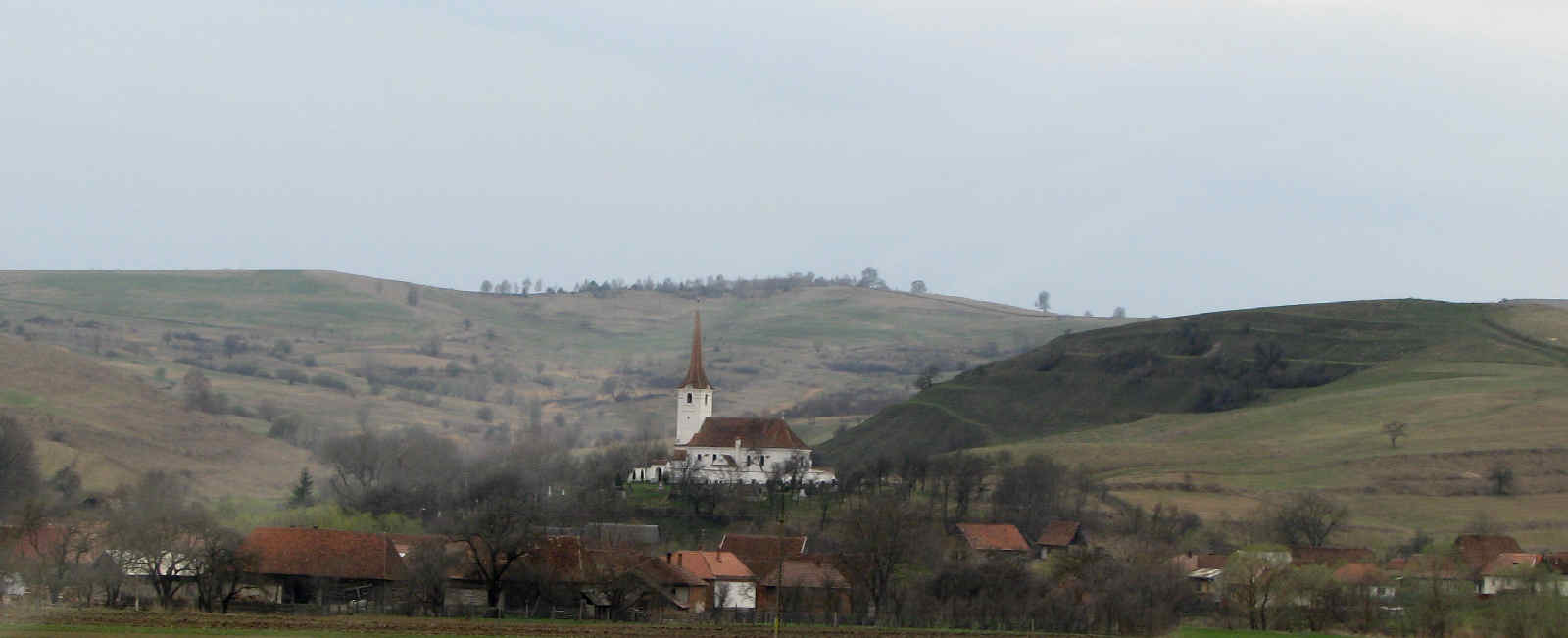 Homoródújfalu